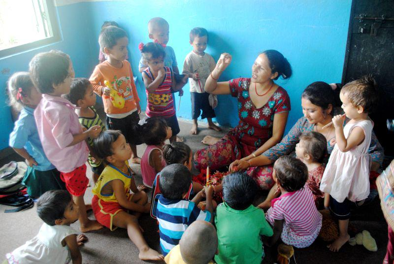 Clinic